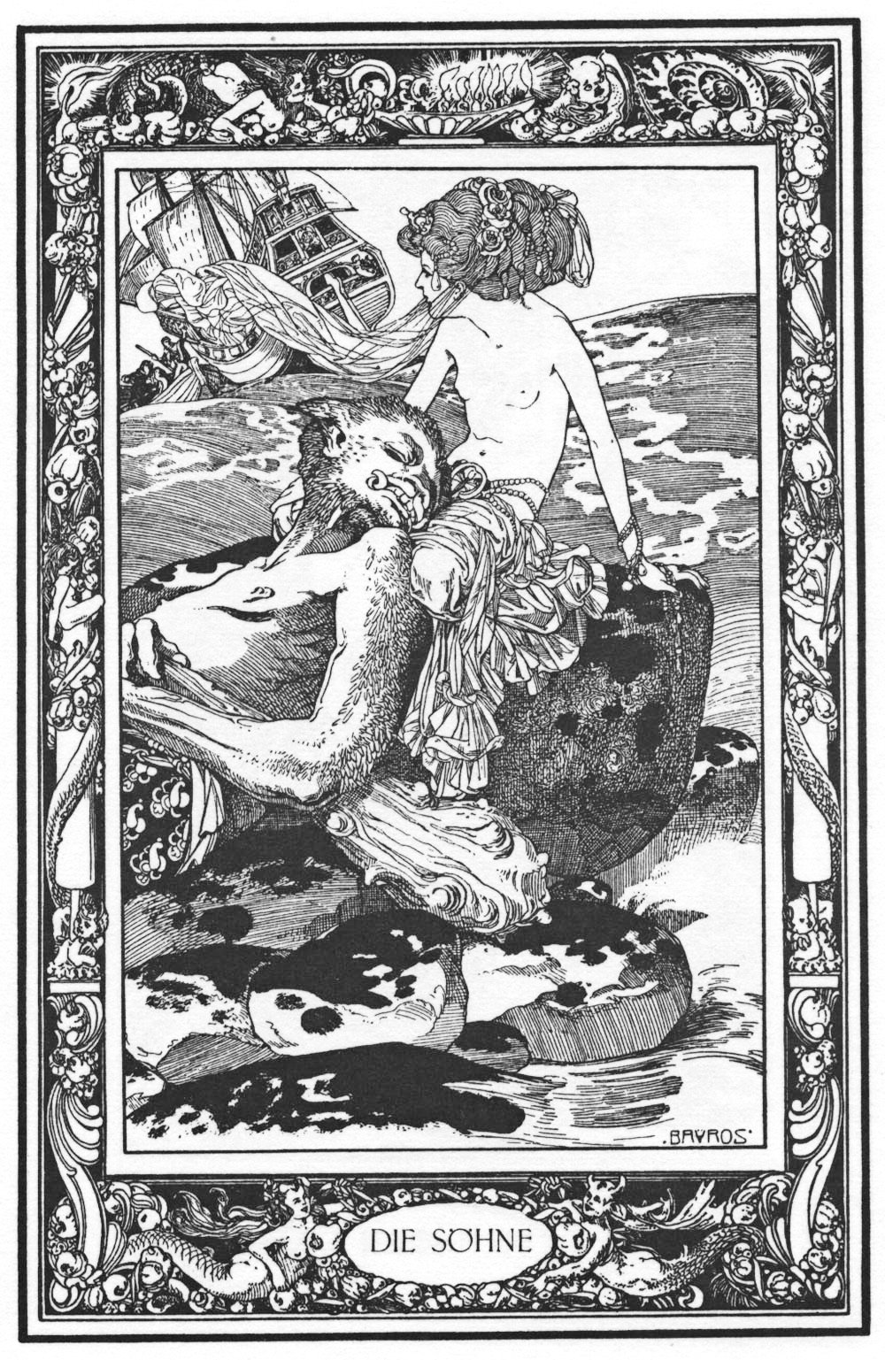 Illustration for Giambattista Basile's "Pentamerone".